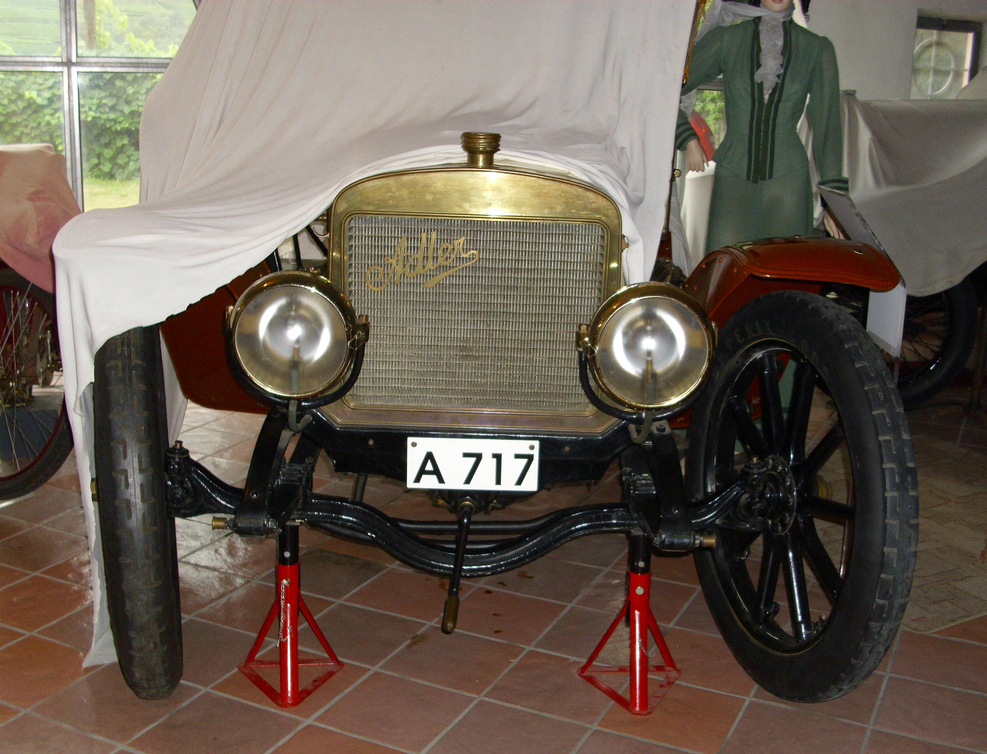 Austro-Adler 7/17 PS von 1912 in der Sammlung Max Reisch